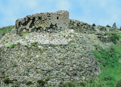 Castell de Llívia en ruïnes, a la Cerdanya